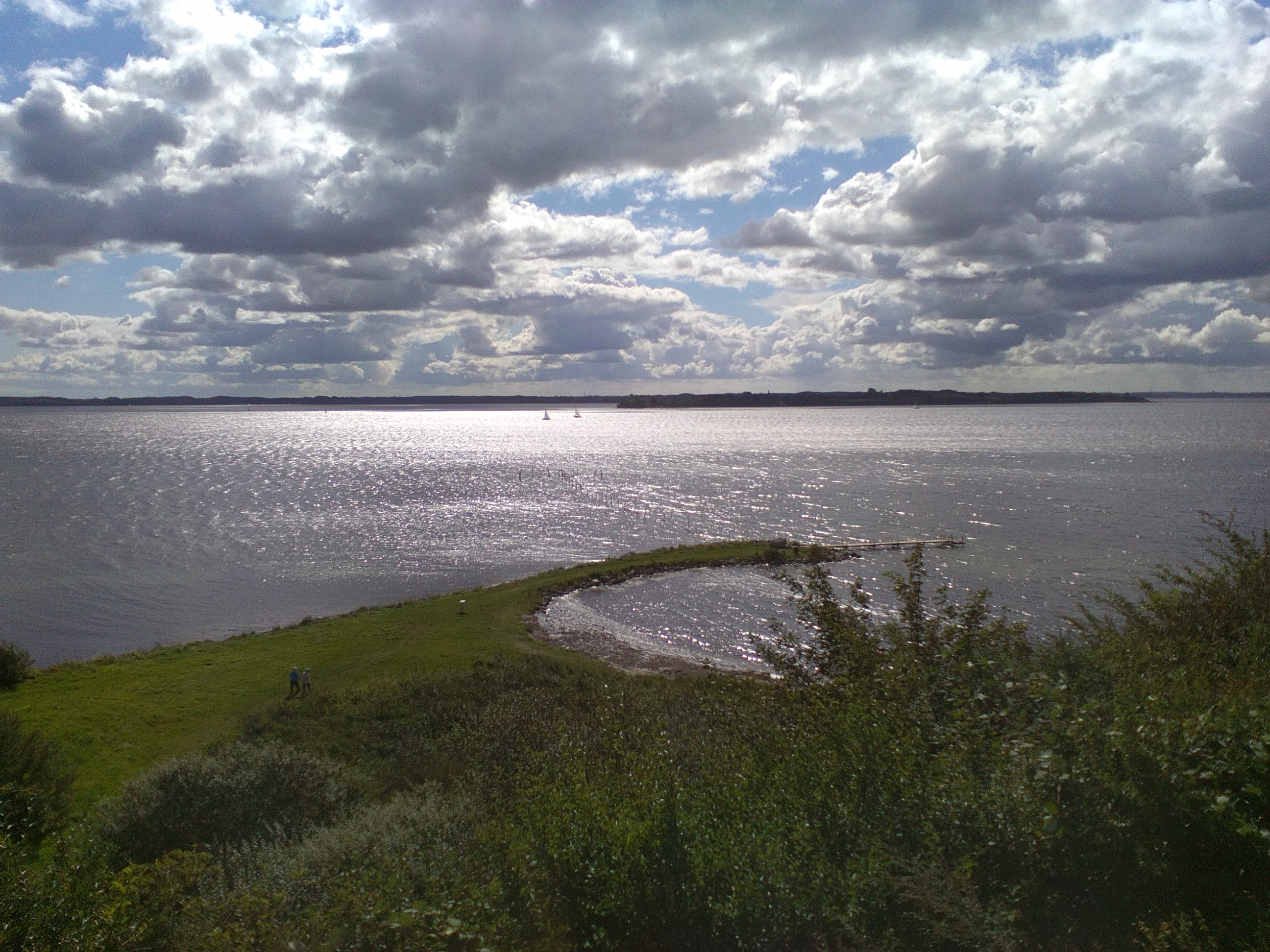 Rendbjerg (Dänemark), Blick über die Flensburger Förde Richtung Halbinsel Holnis (Deutschland)